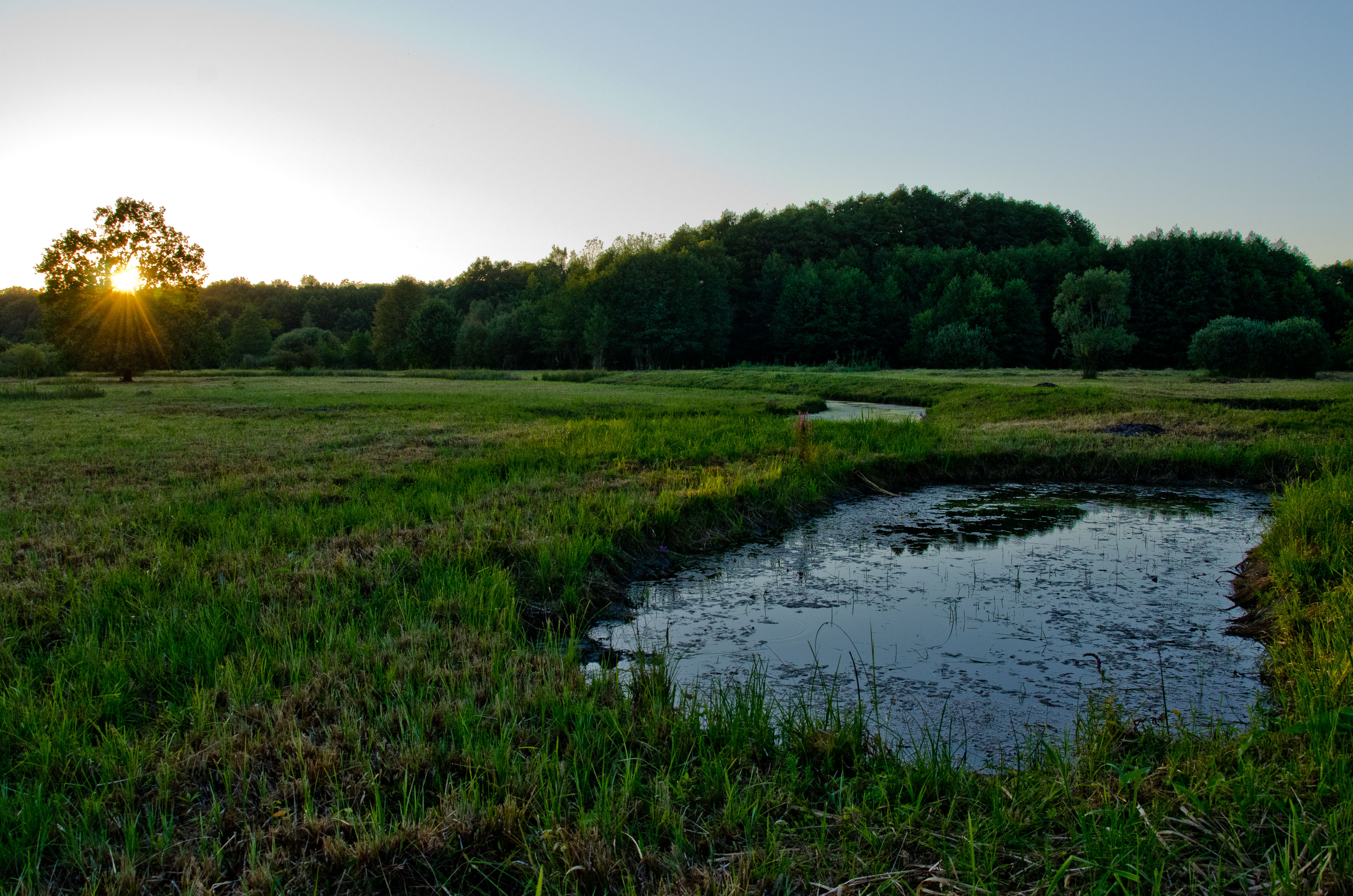 Choryňský mokřad s několika uměle vyhloubenými vodními nádržemi.